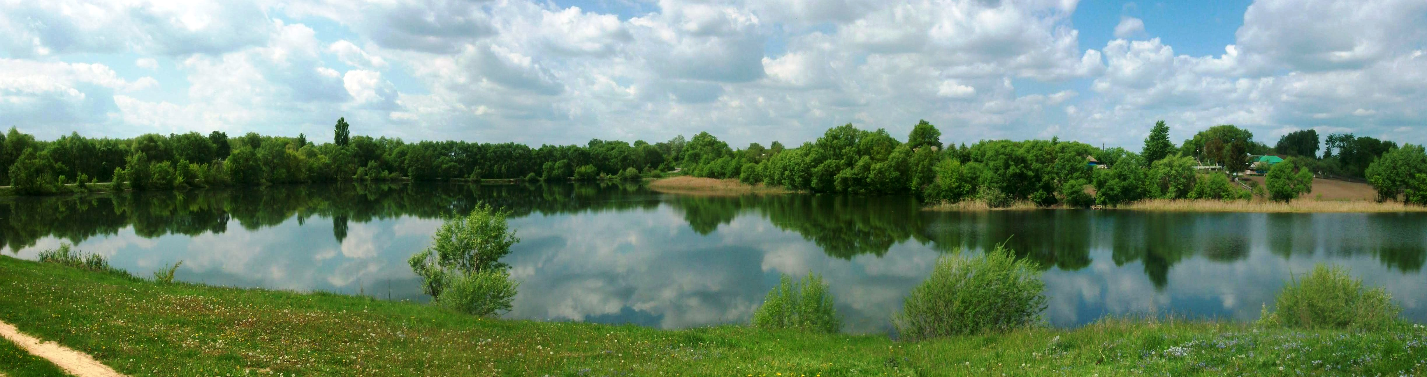 Белокопытово. Ставок